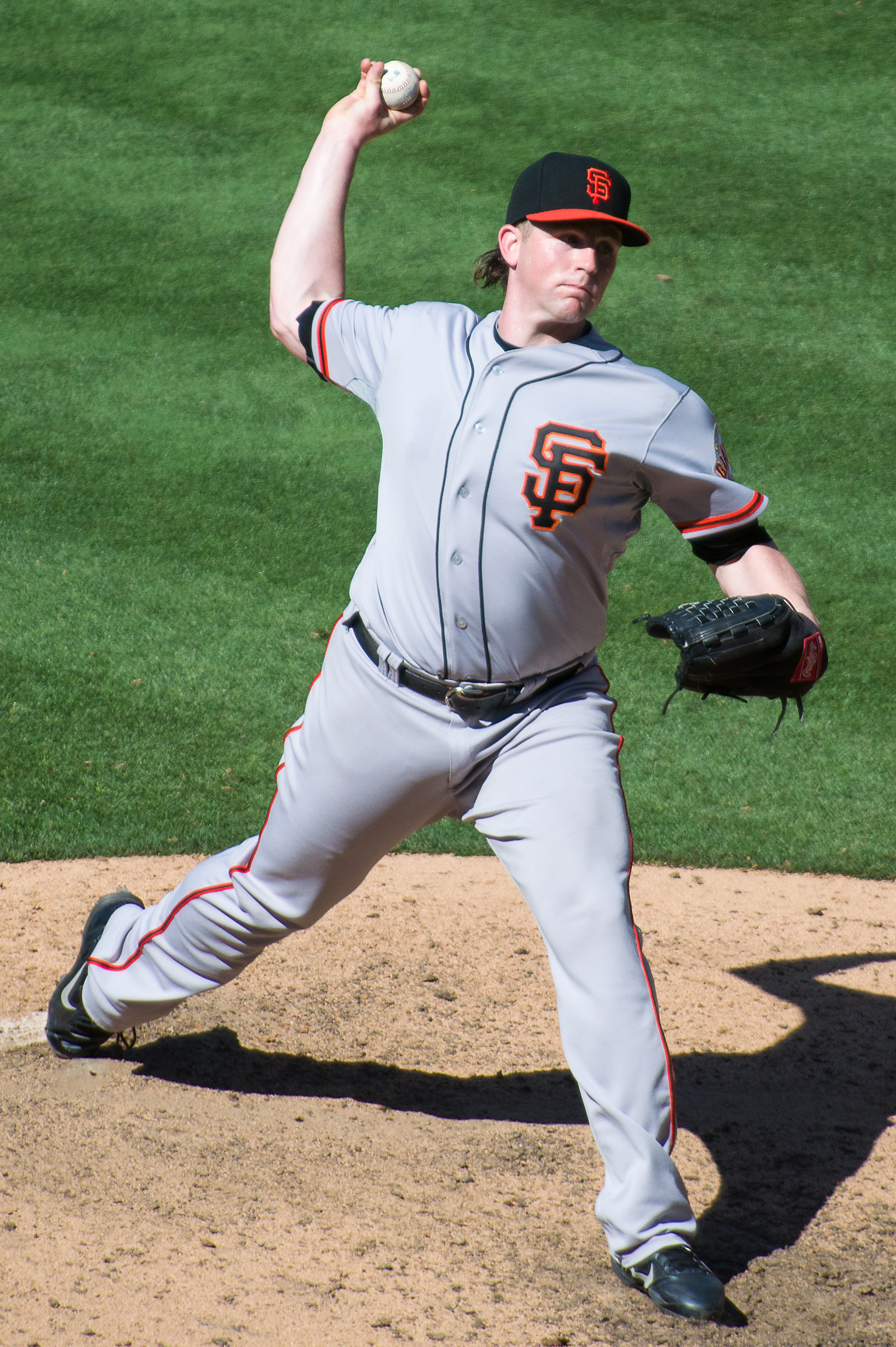 Eric Hacker